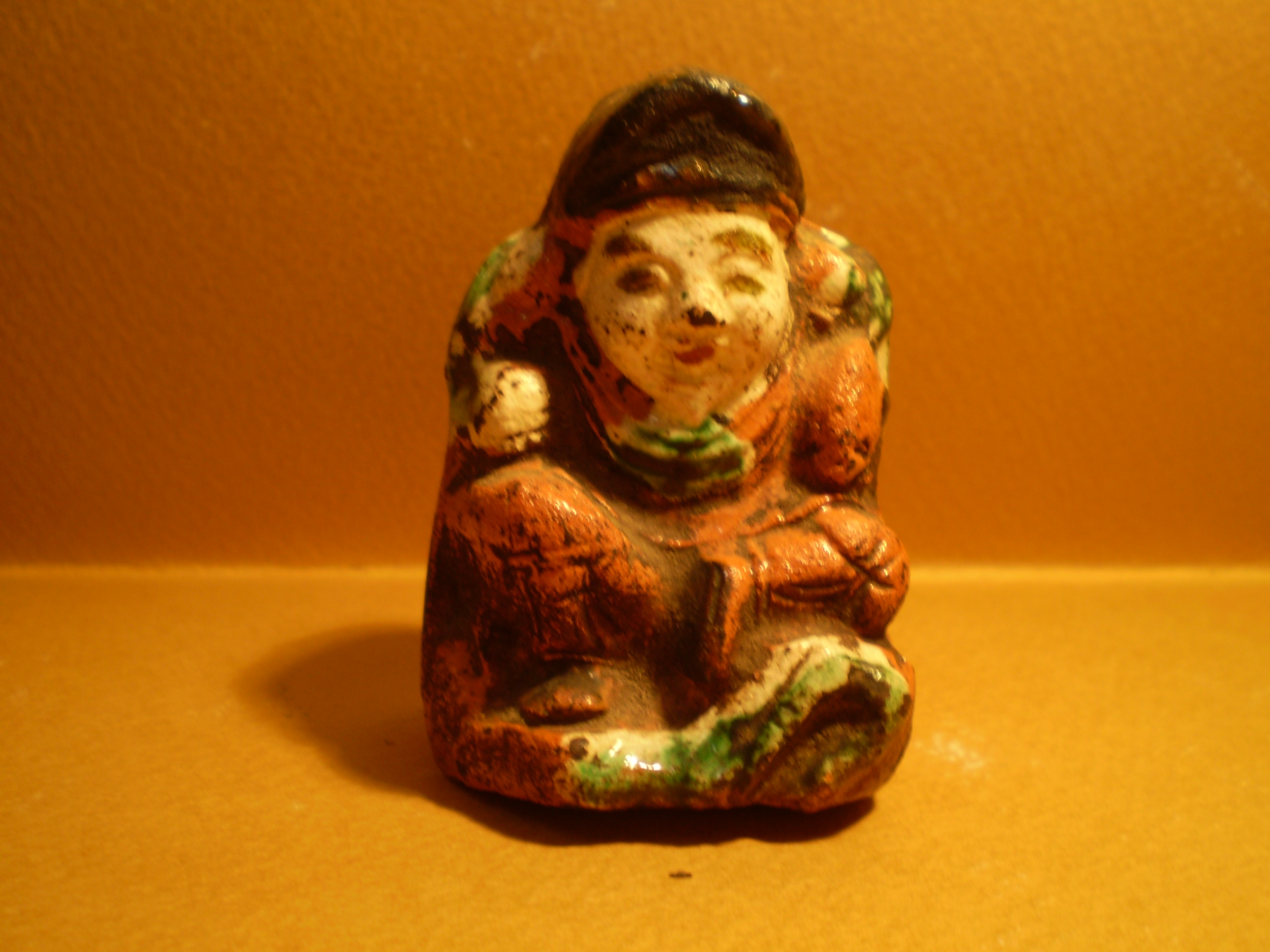 今戸人形「大黒様」（なめ人形）（江戸時代後期～明治） 今戸焼